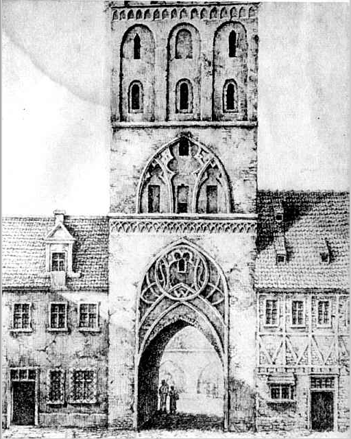 Das ehemalige Schweidnitzer Tor (brama Świdnicka) auf der Schweidnitzer Gasse, Breslau, Niederschlesien, Polen.